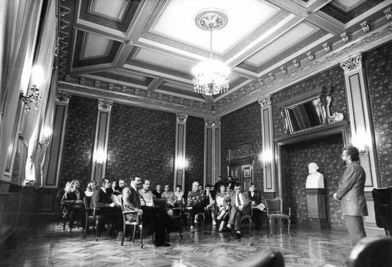 Schwerin, Staatstheater, Flotow-Zimmer ADN-ZB Pätzold-27.4.1989-We-Schwerin: Restaurierung-Anläßlich des Welttheatertages wurde das restaurierte Flotow-Zimmer im Staatstheater Schwerin der Öffentlichkeit übergeben. Nach fast zweijähriger Bauzeit erstrahlt der dem Komponist Friedrich von Flotow gewidmete Raum in neuer Schönheit und wird künftig musikalischen Programmen sowie Begegnungen von Theaterleuten mit ihrem Publikum dienen.